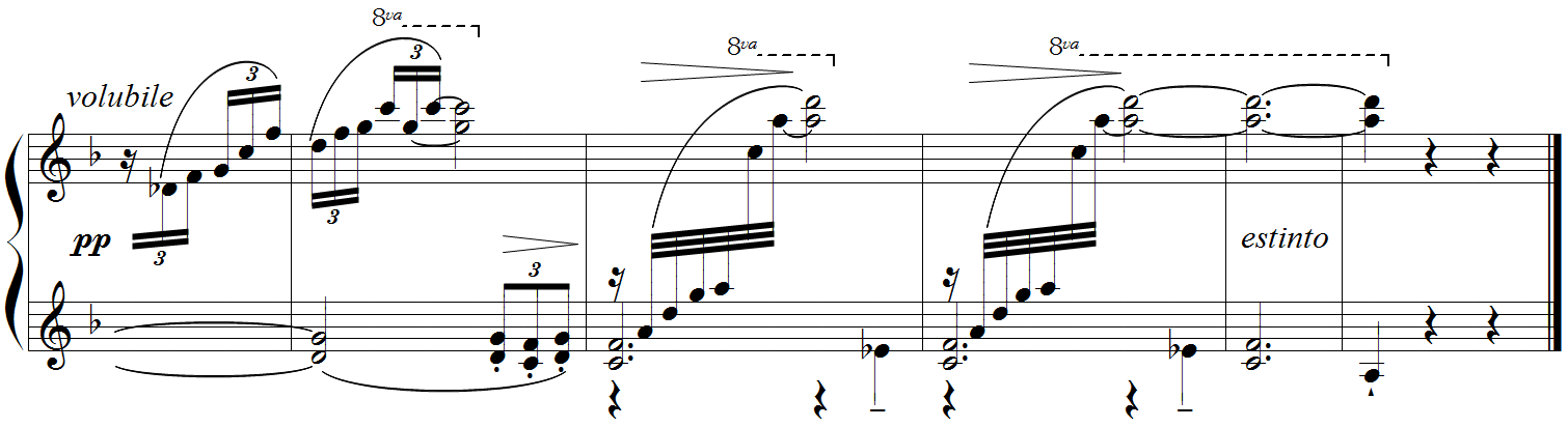 Debussy - Etude "pour les quartes", mes.80-85